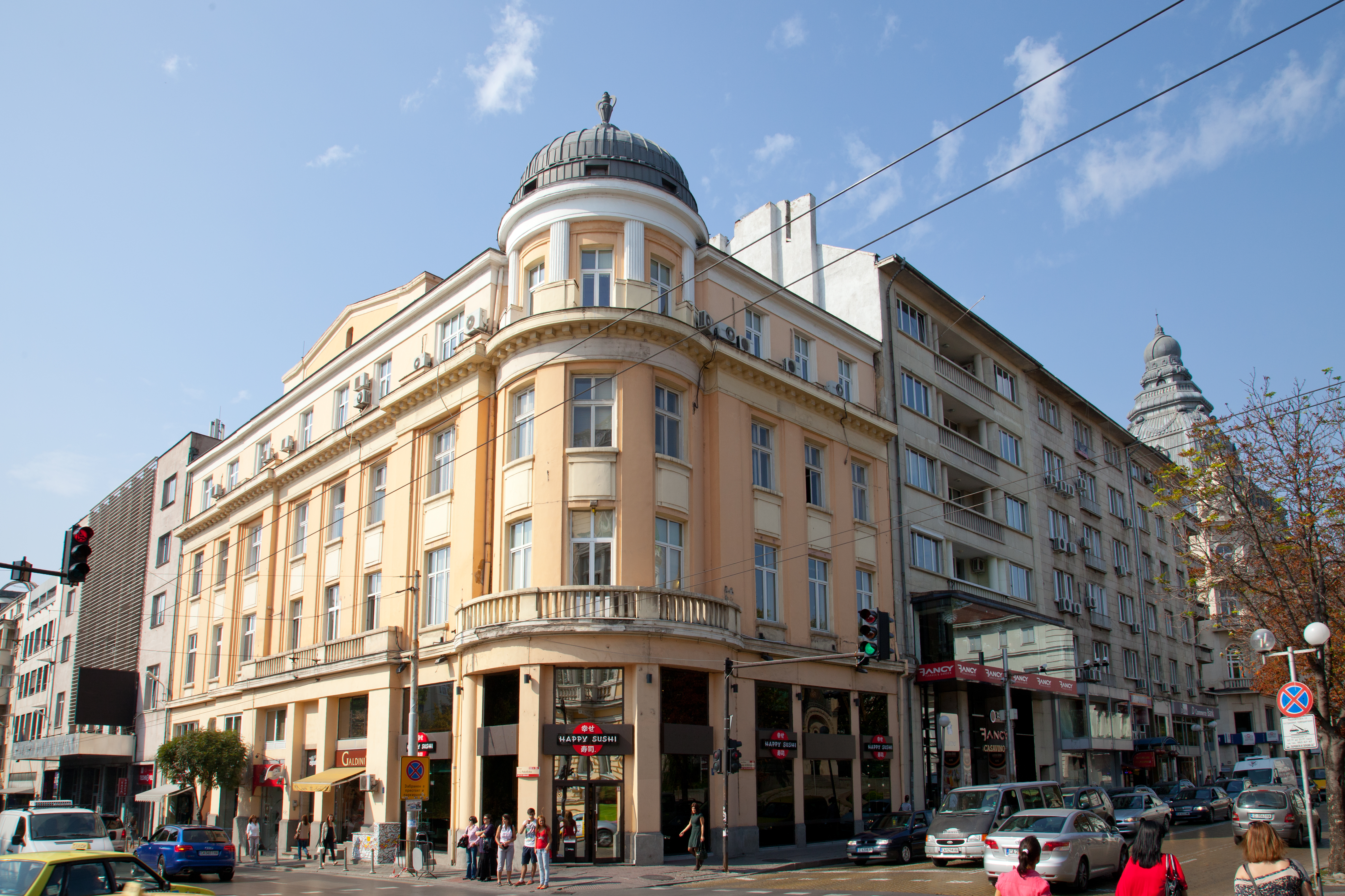 Bulgarien, Boulevard Zar Oswoboditel